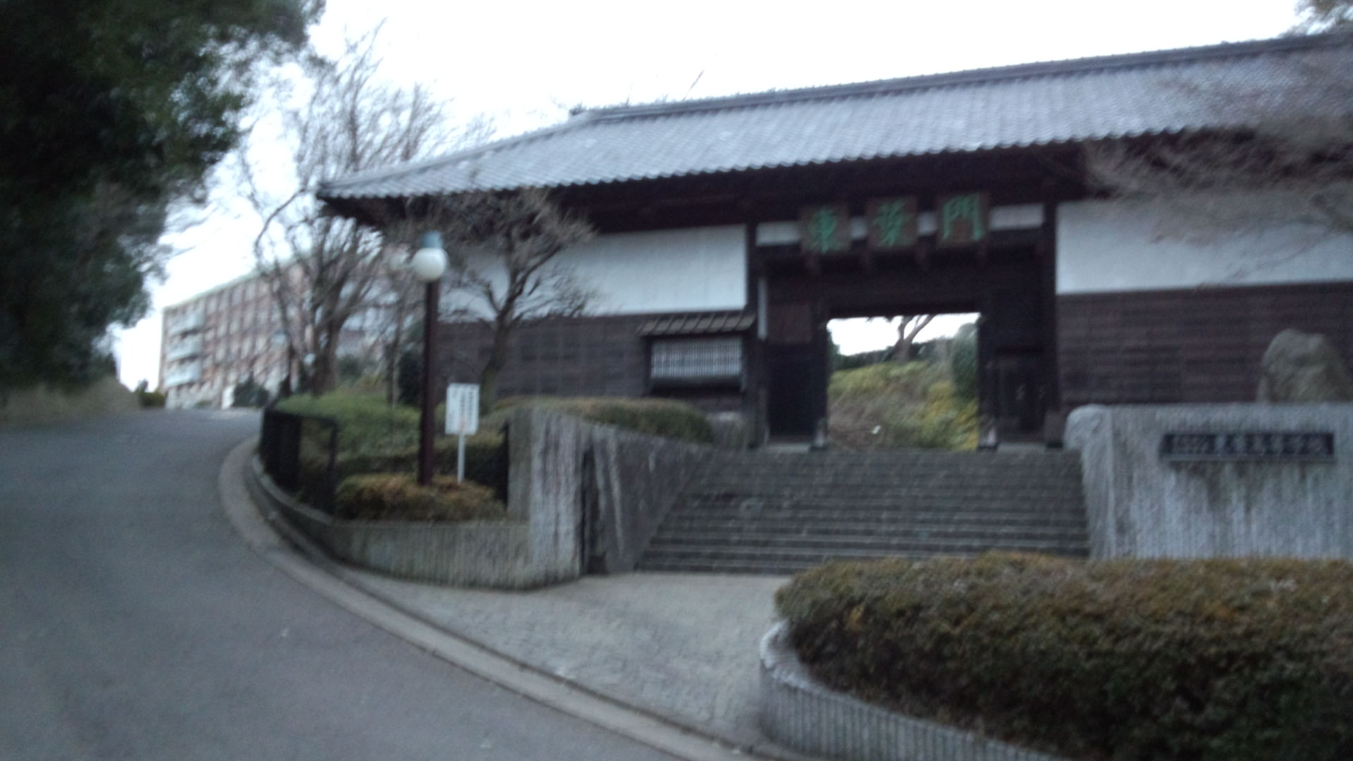 3月1日に在校生により撮影